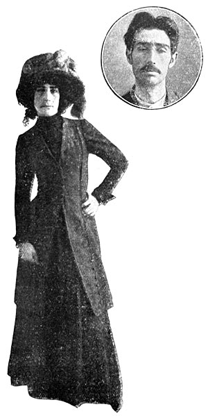 La travesti Juan Montes y también Juan Montes, pero vestida como “La bella Noé”.